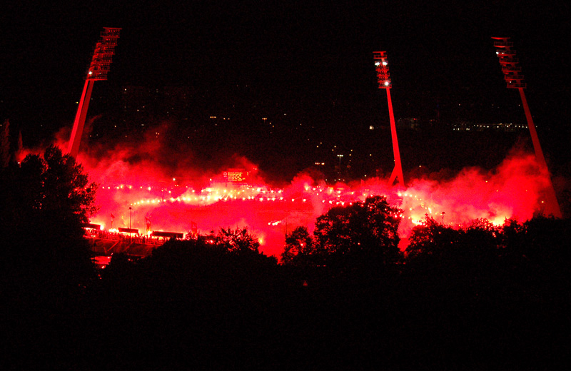 Abschied nach dem letzten Flutlichtspiel im alten Stadion.